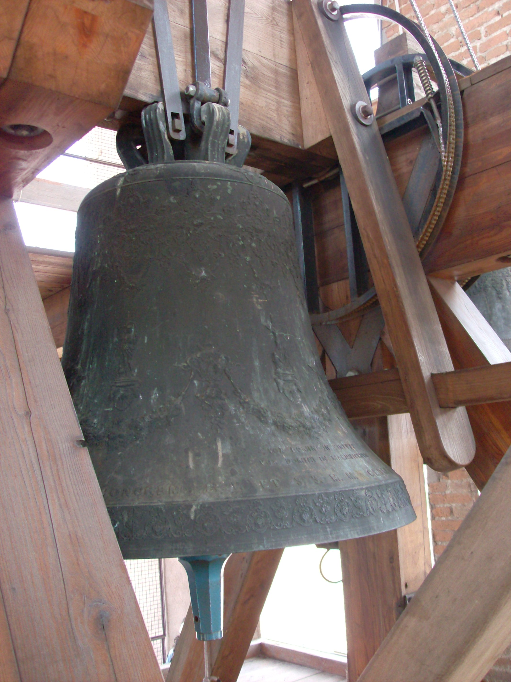 Interno del campanile della cattedrale di Ferrara